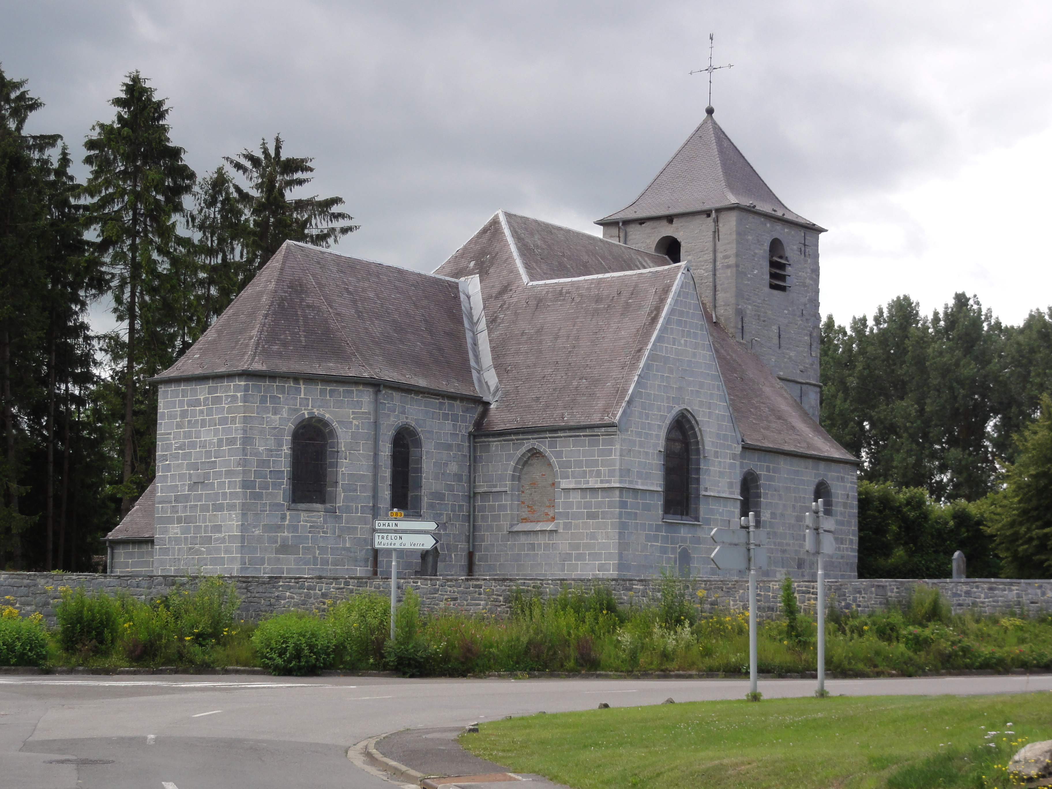 Wallers-en-Fagne (Nord, Fr) église